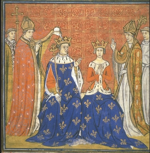 Korunovace Blanky a Ludvíka VIII. Francouzského